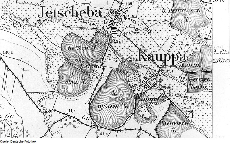 Original image description from the Deutsche Fotothek Großdubrau-Kauppa. Meßtischblatt, Sekt. Luttowitz, 1884